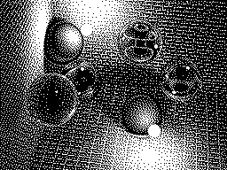 • Légende : Cette conversion-ci relève du pixel art puisqu'aucune méthode n'y parvient automatiquement sans trop de pertes. Un composite est créé tirant parti des meilleures luminosités, puis des pixels sont ajoutés ou enlevés un à un. (Pixels : 256x192 sur ZX Spectrum ; couleurs : 25292, 256, 8, puis 2 avant le fastidieux correctif des pixels.) • Objet, motivation : Démonstration de pixel art difficile (résolution et profondeur). Hommage fusionnel à l'Amiga 500 (1987) et au ZX Spectrum (1982). • Graphiste, année : dpla 2015 • Sources : Amiga - en 1987 (320x200 pixels, {Windows binary unavailable [dead 'dbwrender.zip' link], source available elsewhere though [on GitHub]} • Crédits : 1987, David B. Wecker (DBW_Render Amiga 500). 1989, John H. Lowery (DBW_Render sur MS-DOS). 2007, David Kinder (DBW_Render sur Win. x86).